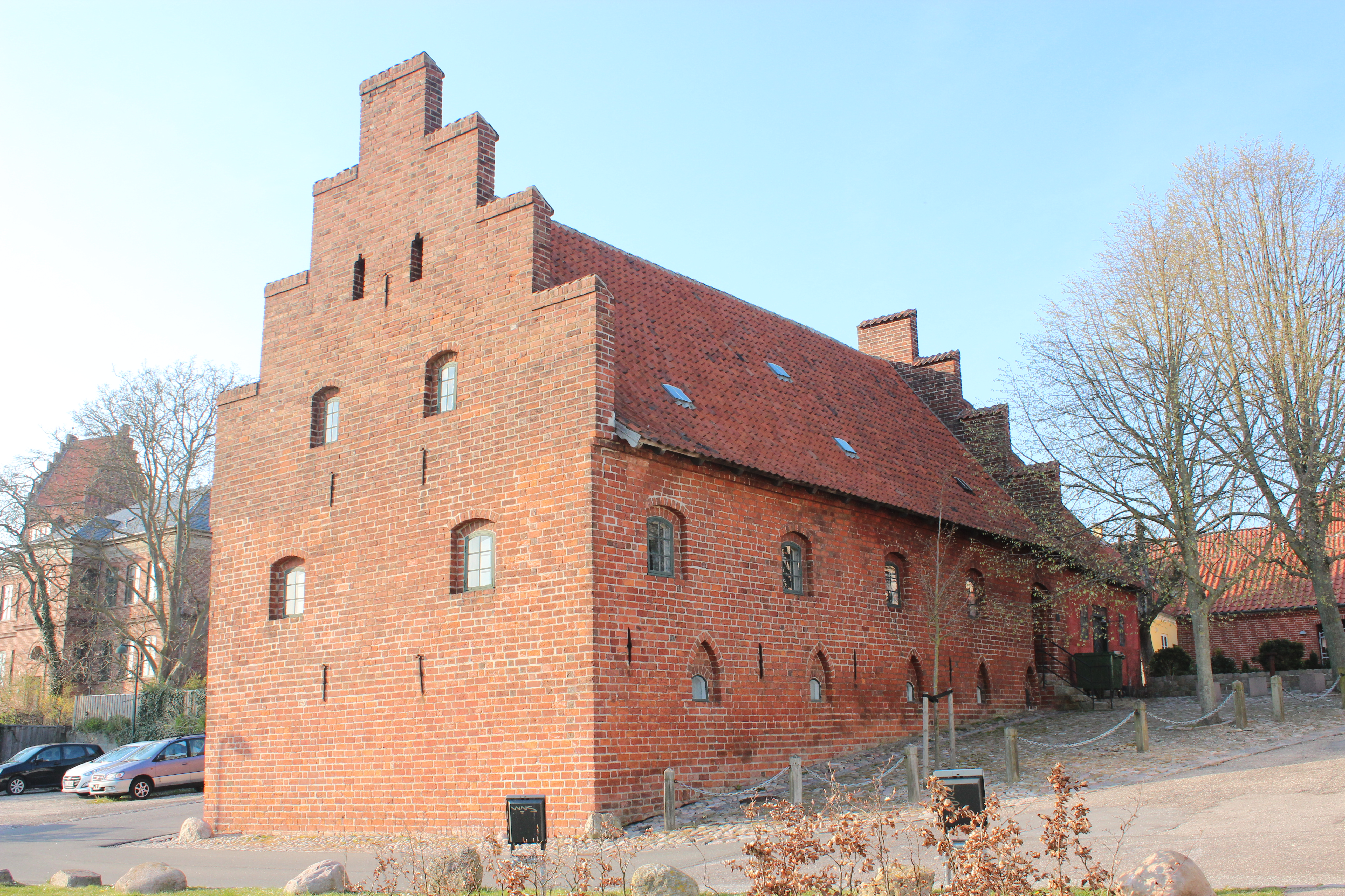 Set fra syd med gavlen og facaden mod Møntergade.